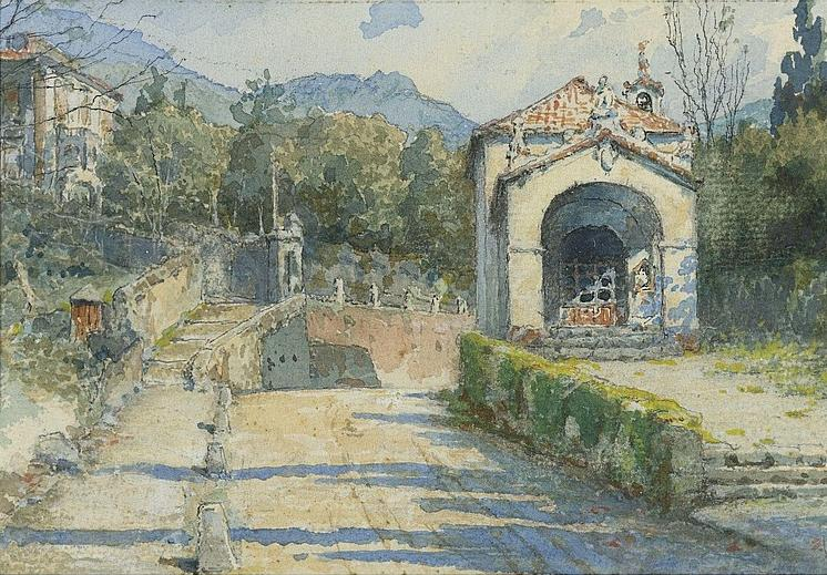 Villa and Gatehouse Trieste, Friuli-Venezia Giulia, Italy.